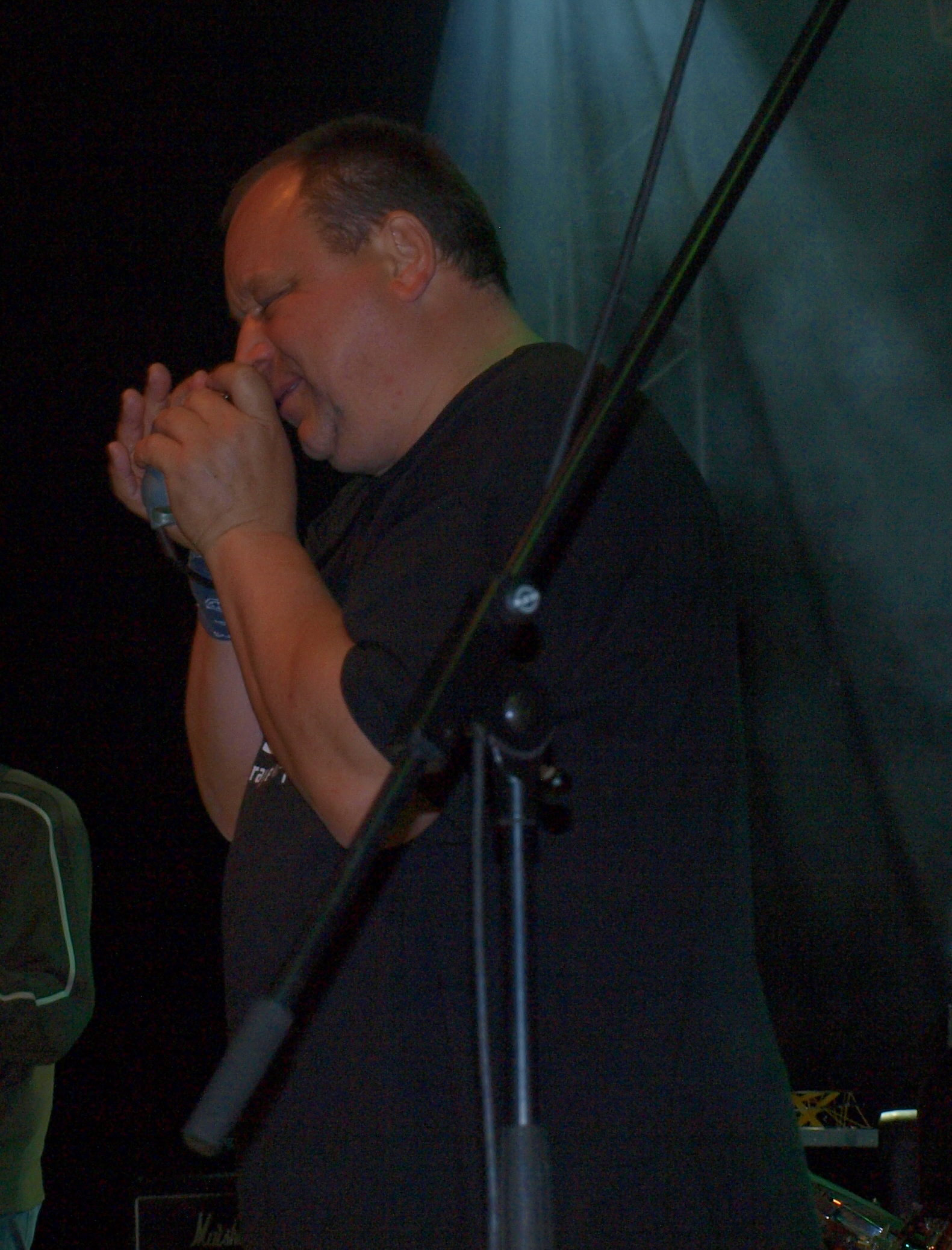 Robert Johnsons Blackbone na 7. Mega Bikers susretima u Slavonskom Brodu.